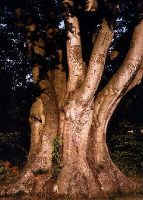 Riesenbuche Fagus sylvatica von Altmugl Fotograf: Walter J. Pilsak, Waldsassen